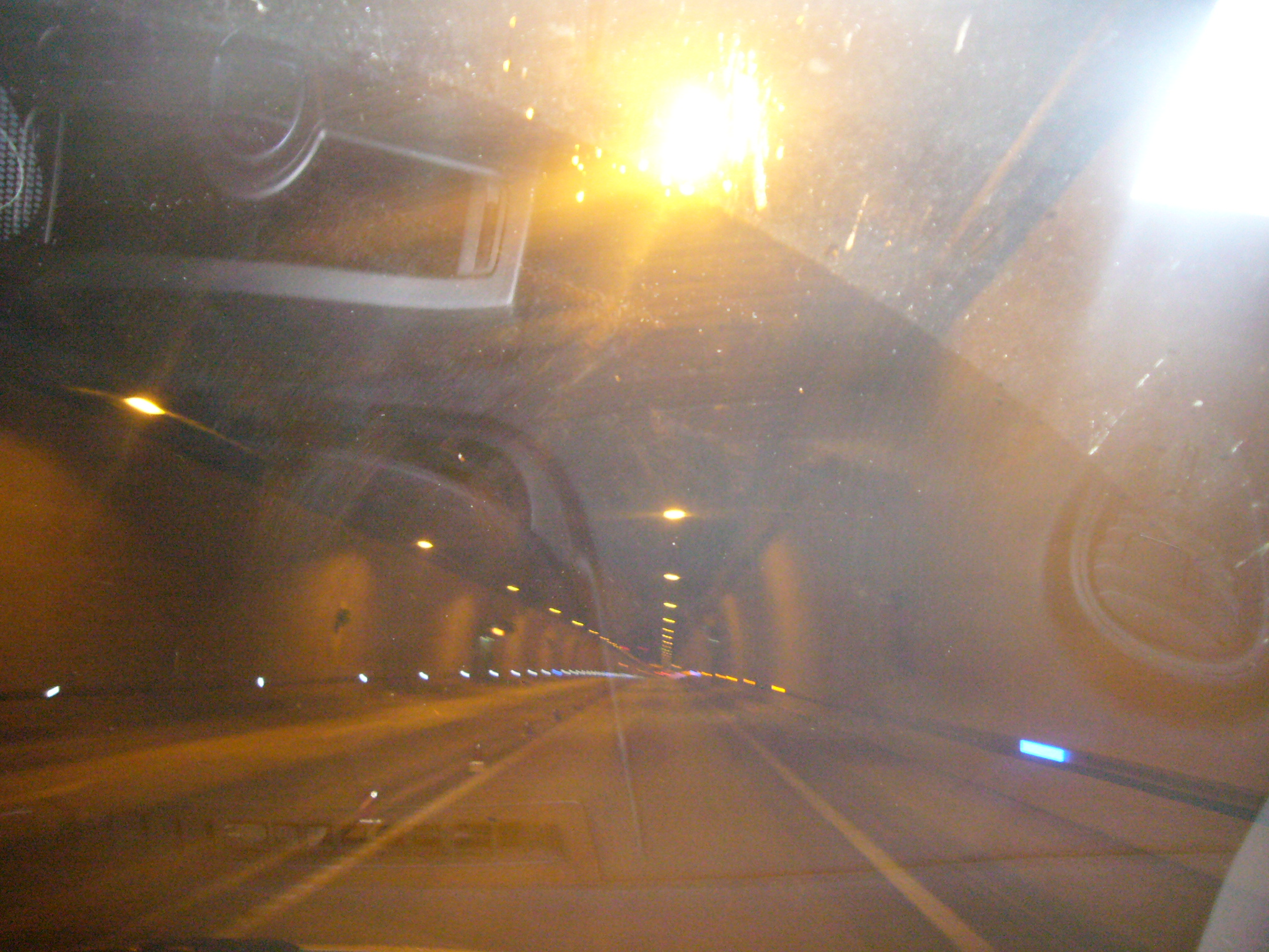 Nou túnel de Viella. Foto de 2011